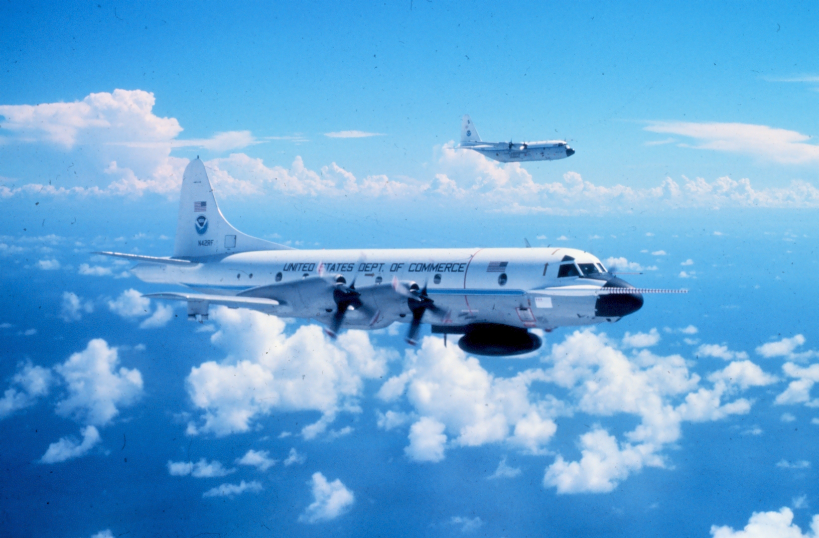 NOAA P-3 борт N42RF (NOAA 42) и NOAA C-130 борт N6541C в полёте